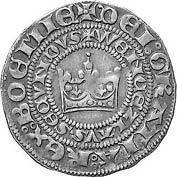 Grosz praski Wacława II. Awers. autor: mzopw licencja: GNU FDL